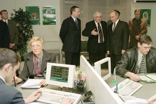 МОСКВА. Посещение Вернадского отделения Сбербанка России. В операционном зале по обслуживанию юридических лиц.